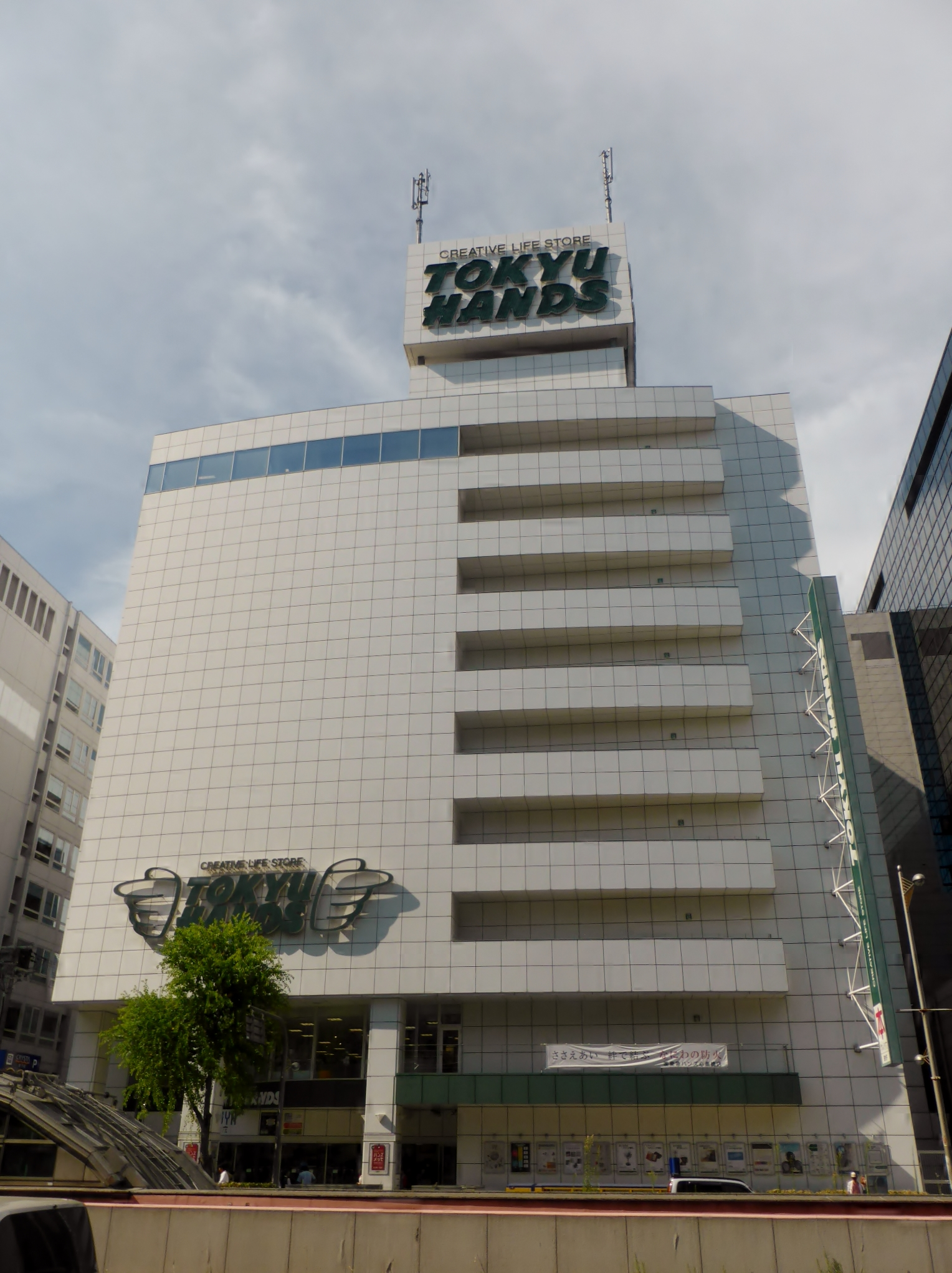 東急ハンズ心斎橋店を撮影。